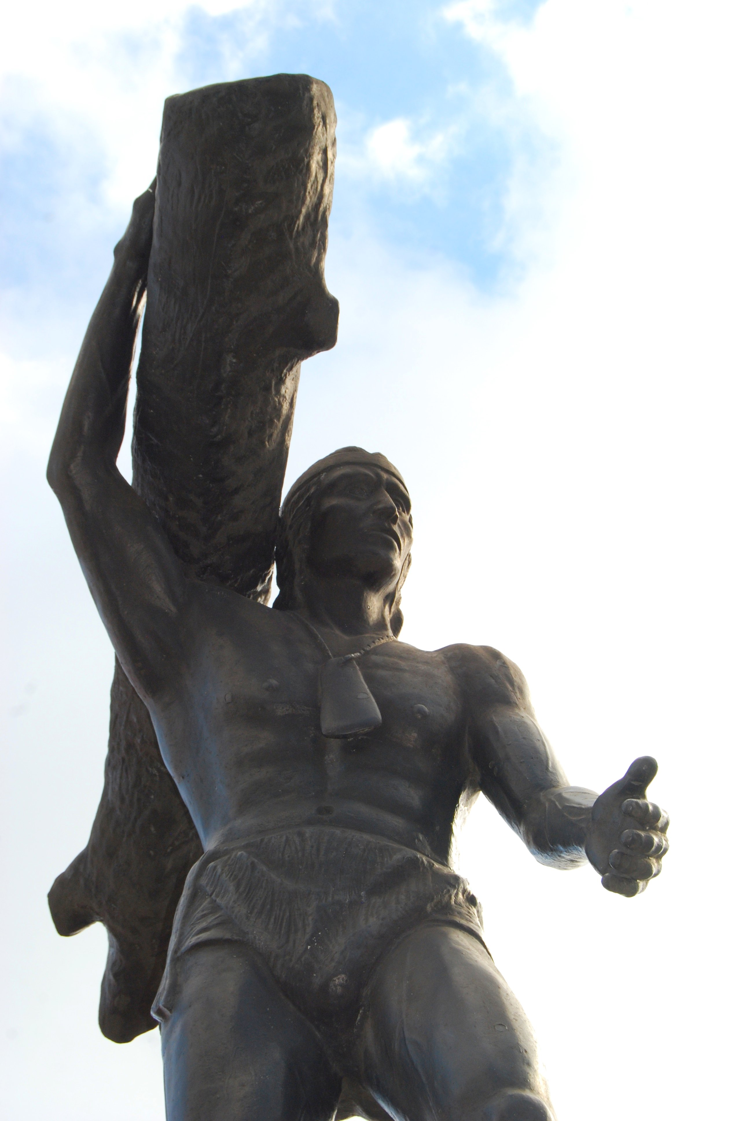 Monumento a Caupolicán, estatua de José Troncoso (1985) ubicada en la esquina de la avenida Caupolicán y la calle Manuel Montt, en el Sector Centro de la ciudad de Temuco, Chile.